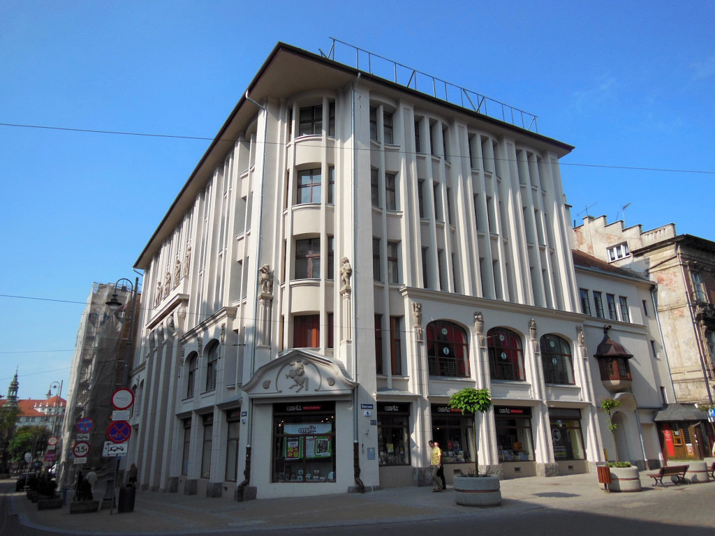 Dom Towarowy Jedynak, ul. Gdańska 15 w Bydgoszczy (zbud. 1910)